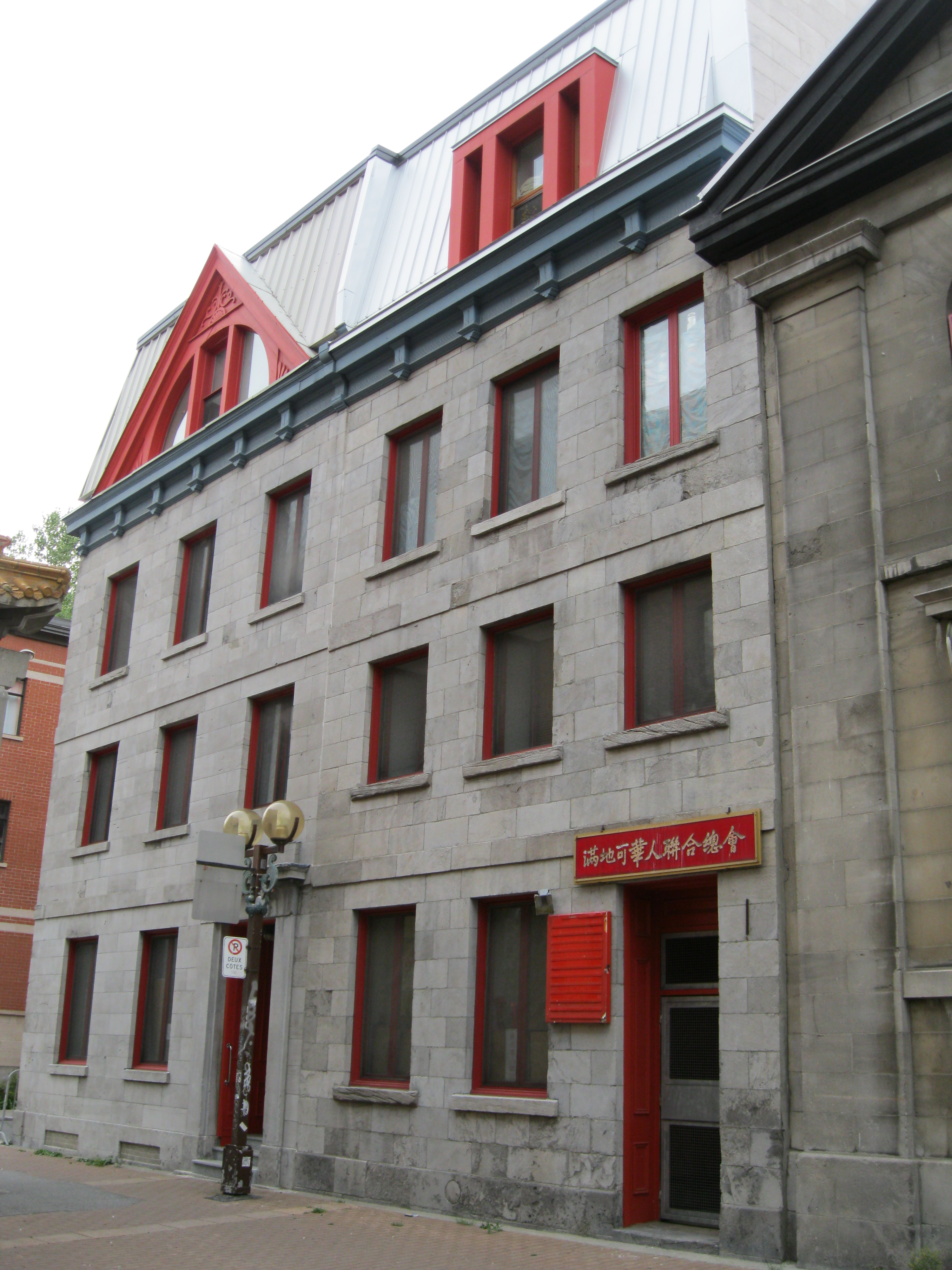 Église de la Mission-Catholique-Chinoise-du-Saint-Esprit, 205-211, rue De La Gauchetière Ouest, Montréal.